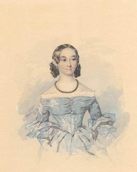 Портрет Катерини Абази роботи Тараса Шевченка, Акварель